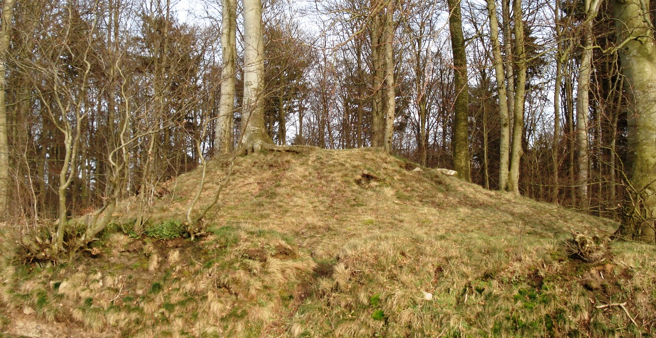 Südlicher Grabhügel bei Stubbenberg - West